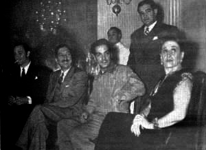 MariaTereza4